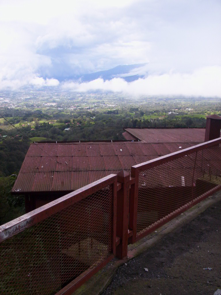 Valle Central de Costa Rica desde Rancho Redondo mi propio trabajo